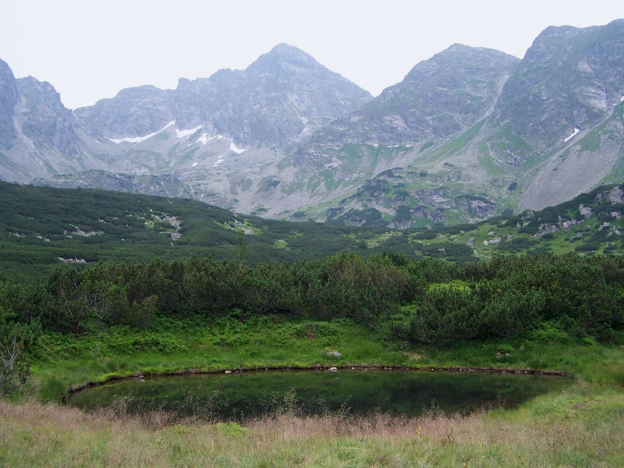 Troiśniak(Tatra Mountains, Dolina Gąsienicowa)